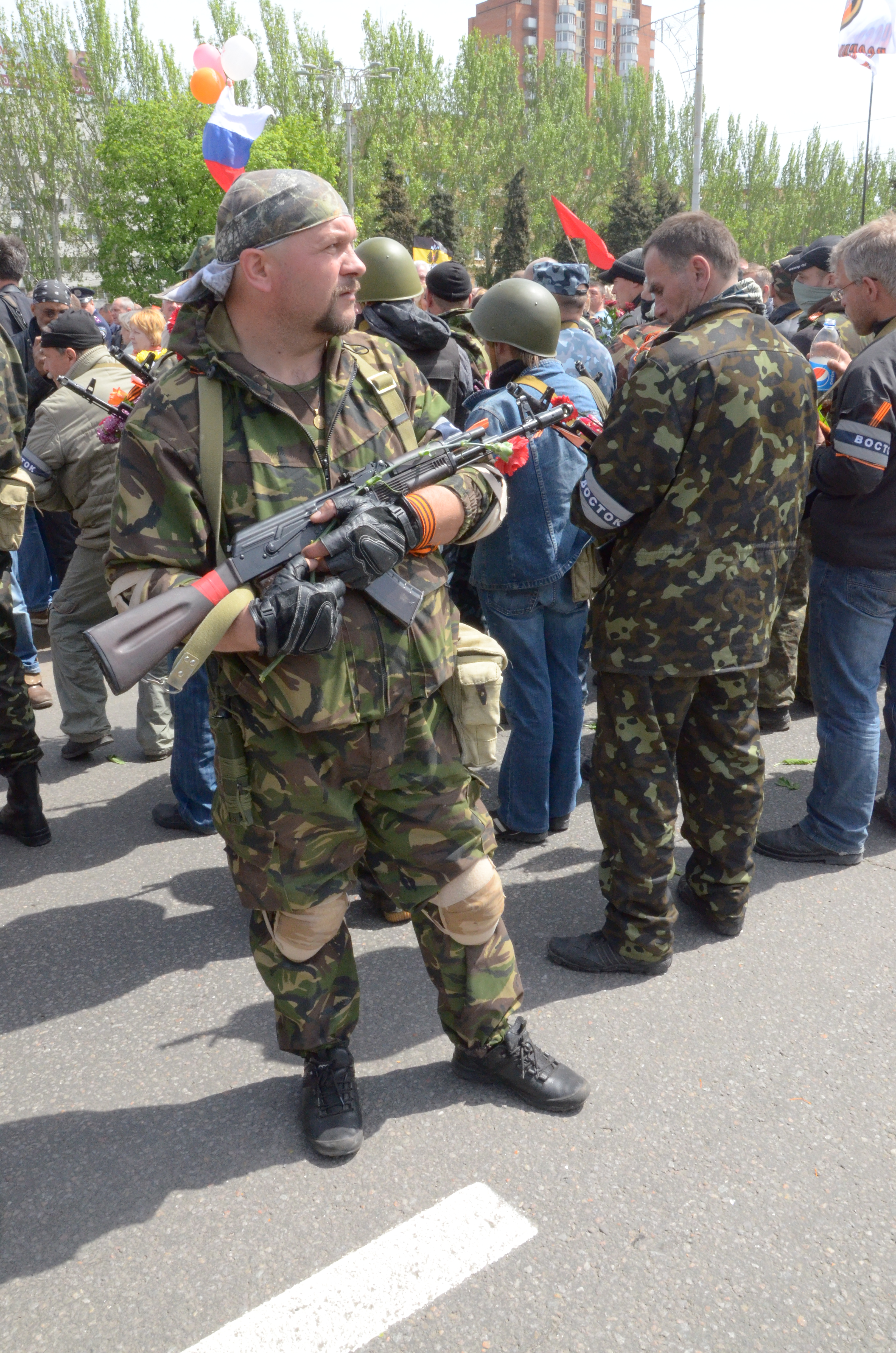 День Победы в Донецке